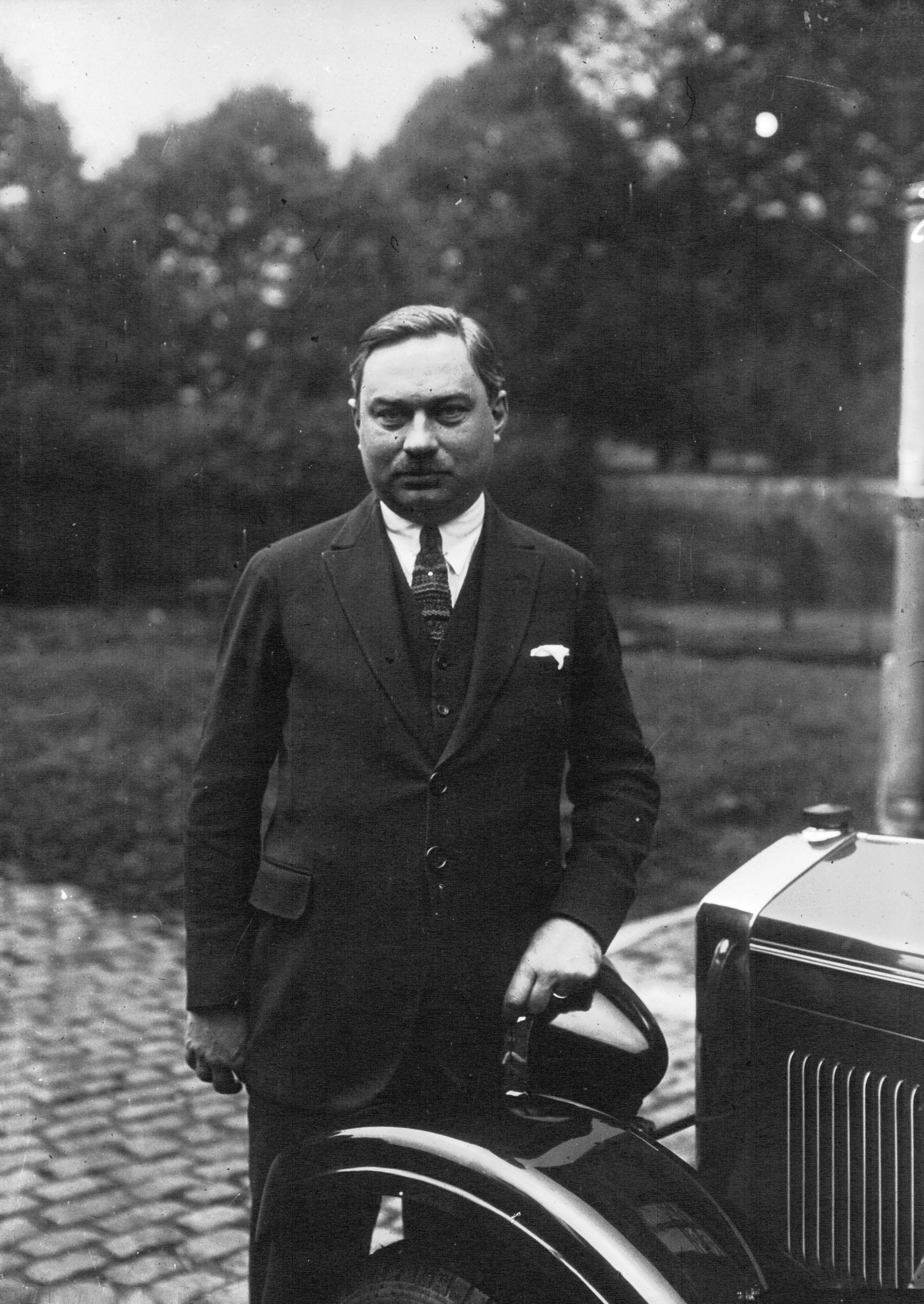 Portrait de M. Jacques Bignan (pilote de la voiture Fiat 2 litres, 6 cylindres type 520 faisant le tour de France en pause).